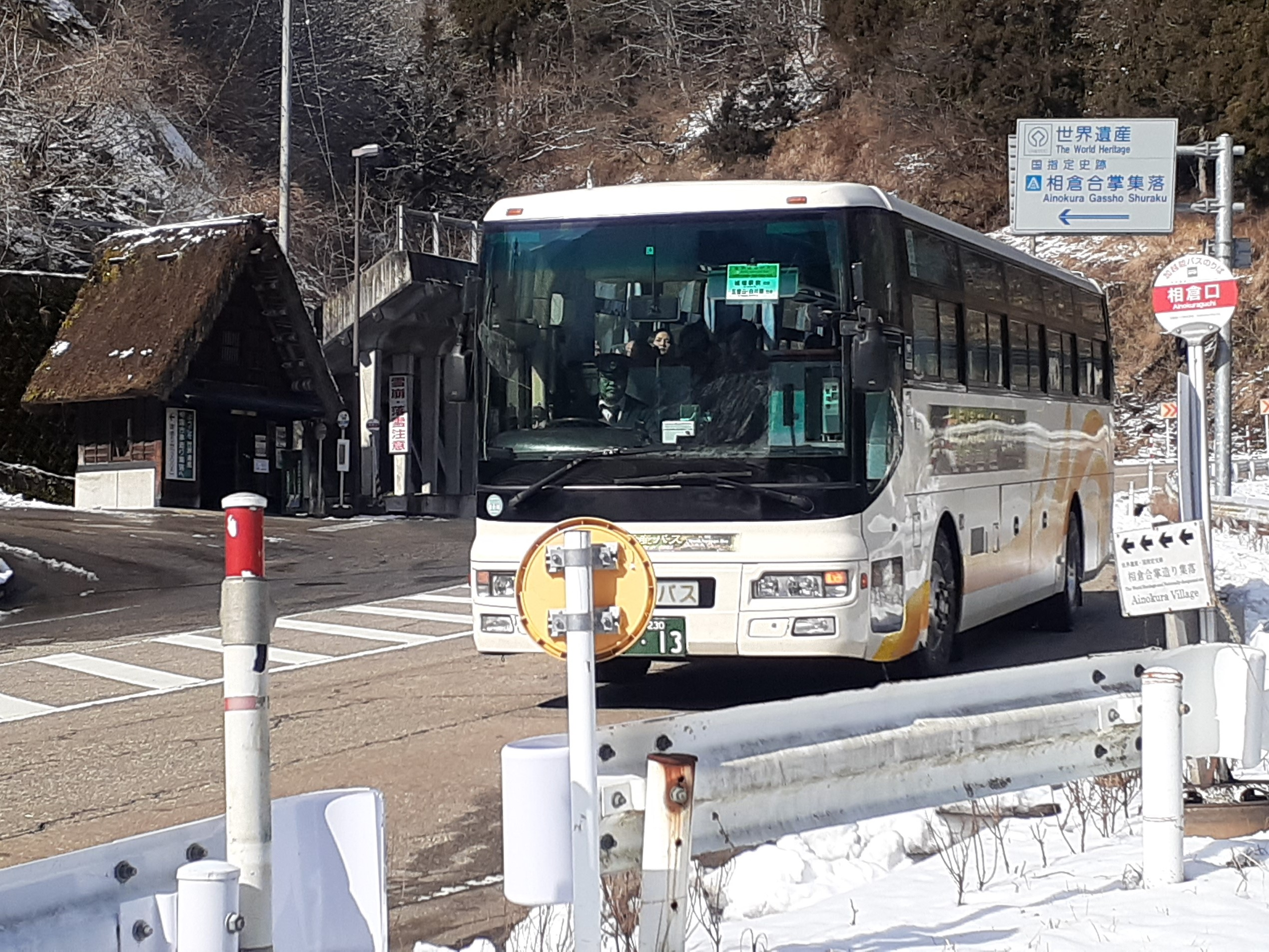 加越能バス 世界遺産バス 城端駅前・五箇山経由白川郷行き 相倉口バス停にて撮影